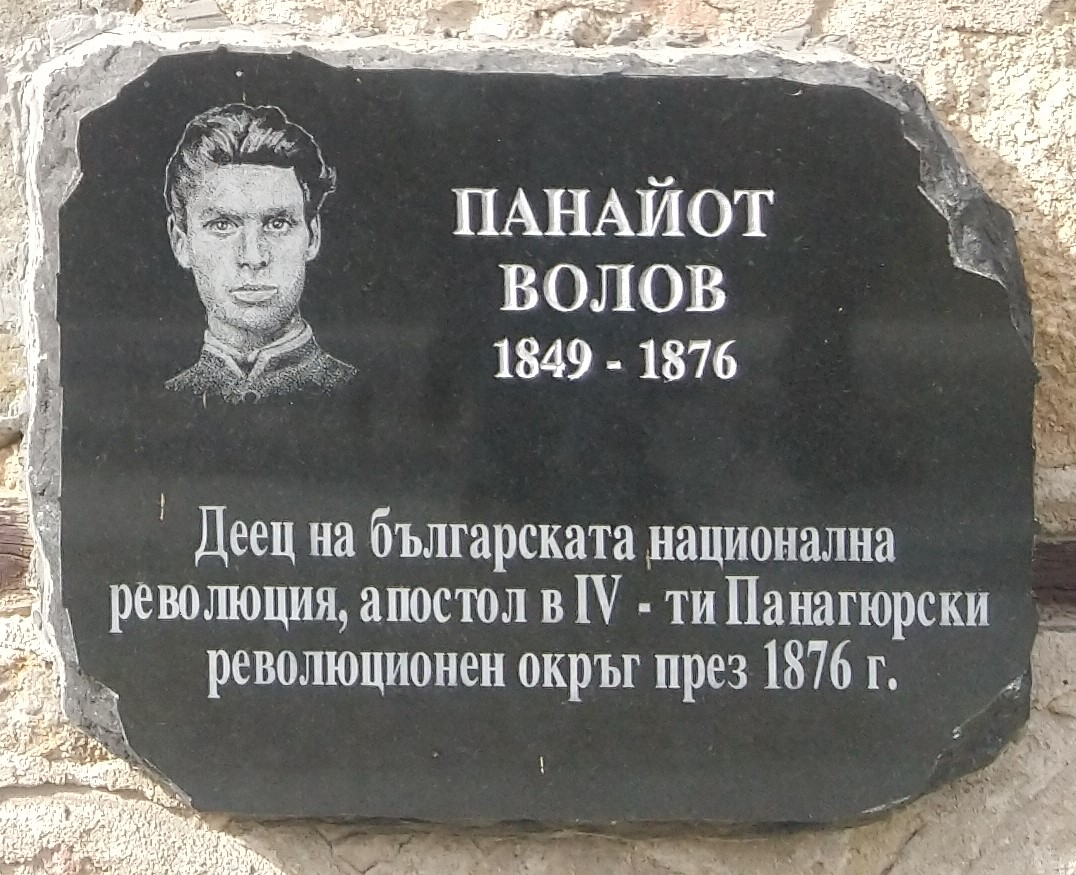 Панайот Волов (1849 - 1876) - плоча в Исторически музей Панагюрище - Надпис: Деец на българската национална революция, апостол в IV-ти Панагюрски революционен окръг през 1876 г.